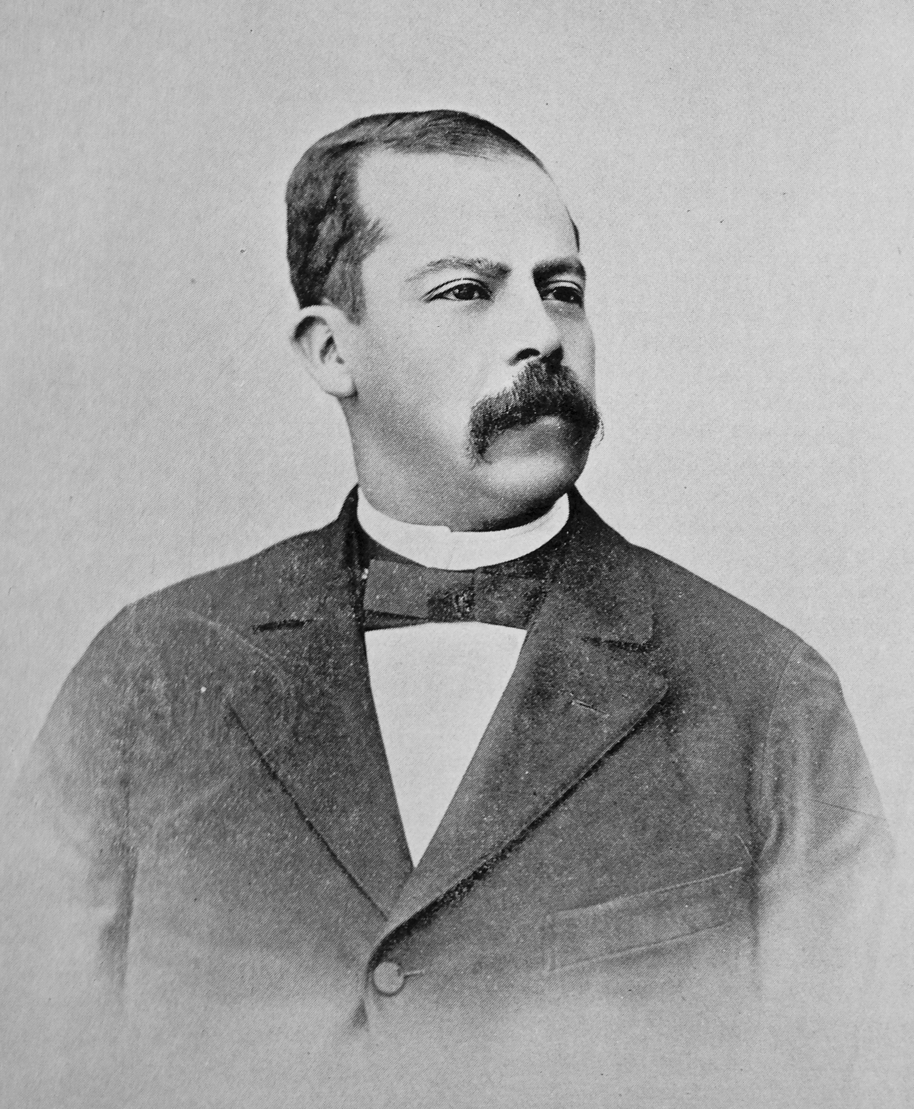 Retrato del licenciado Manuel Estrada Cabrera al momento de ser nombrado designado a la presidencia en 1898.